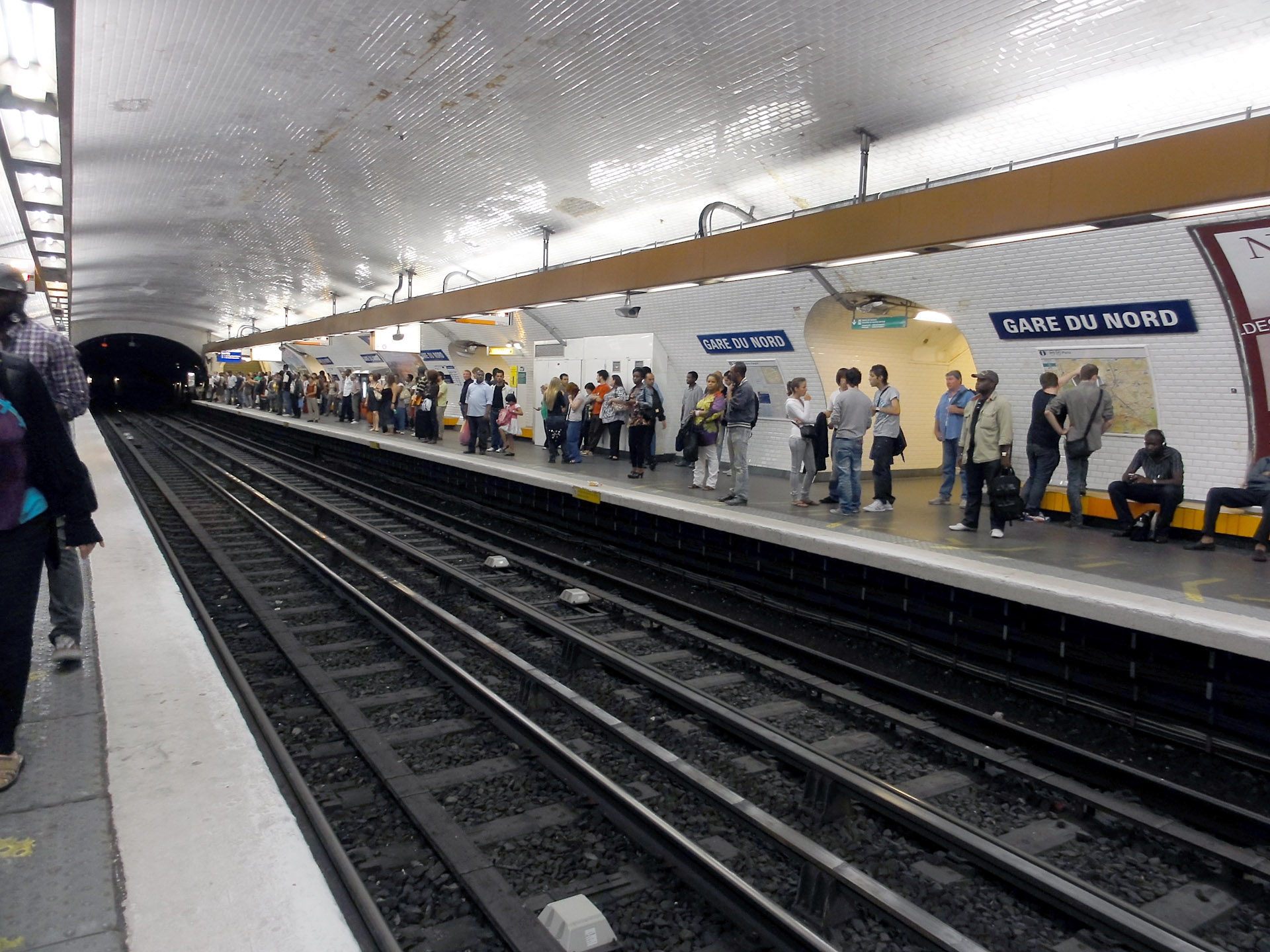 La station Gare du Nord de la ligne 5 du métro de Paris, France.